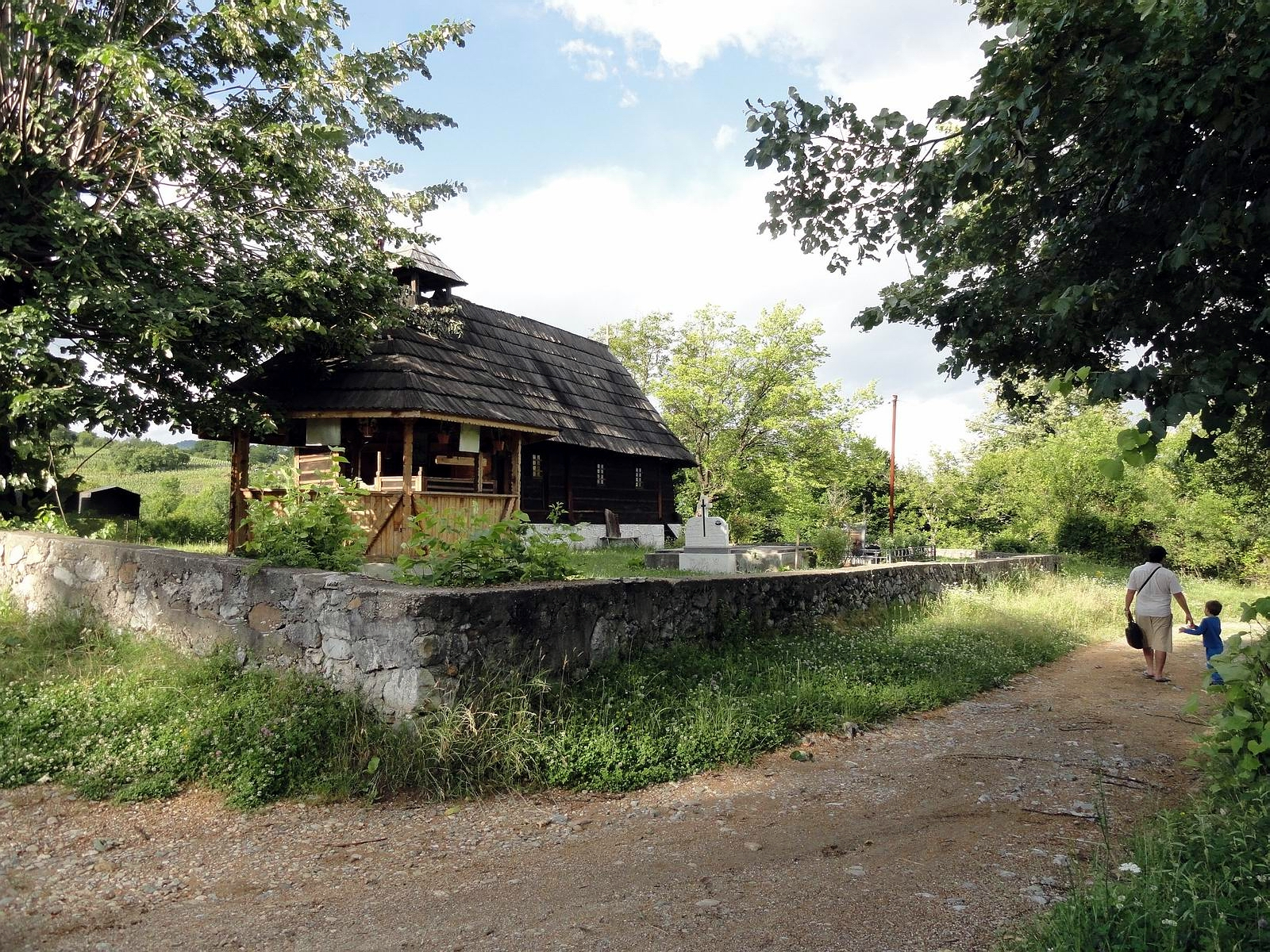 Église en bois dans le village Gornoviţa, departement Gorj, Roumanie, monument historique. Classification Commission nationale des monuments, des ensembles et des sites historique (CNMASI): CNMASI 25 B 167 Gornoviţa village - L'église "Nativité de la Vierge", construit en 1764, reconstruit de 1939 à 1945. Assuré.